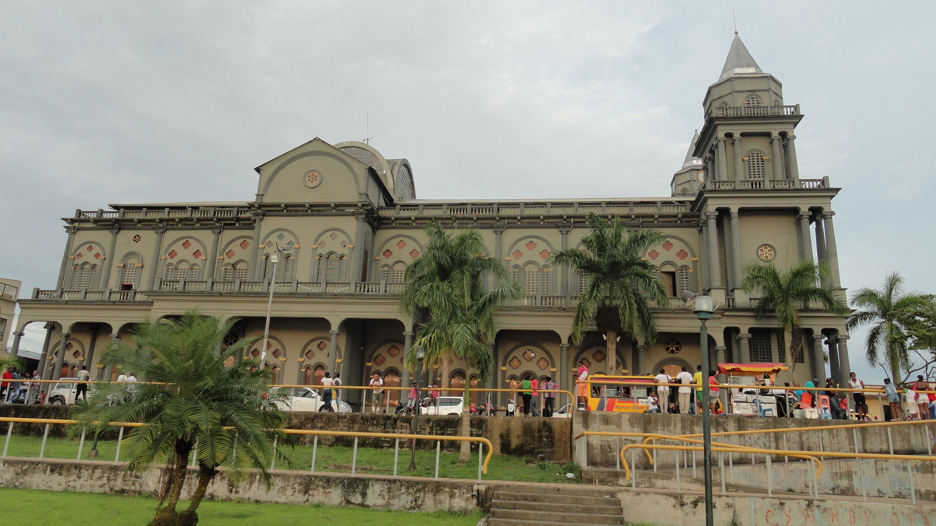 Catedral San Francisco de Asís, Quibdó.